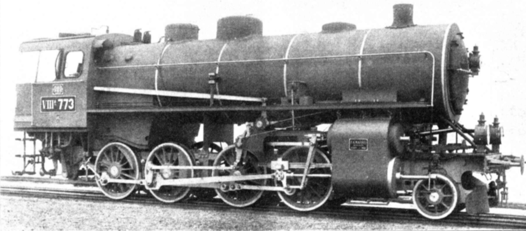 Dampflokomotive Badische VIII e.